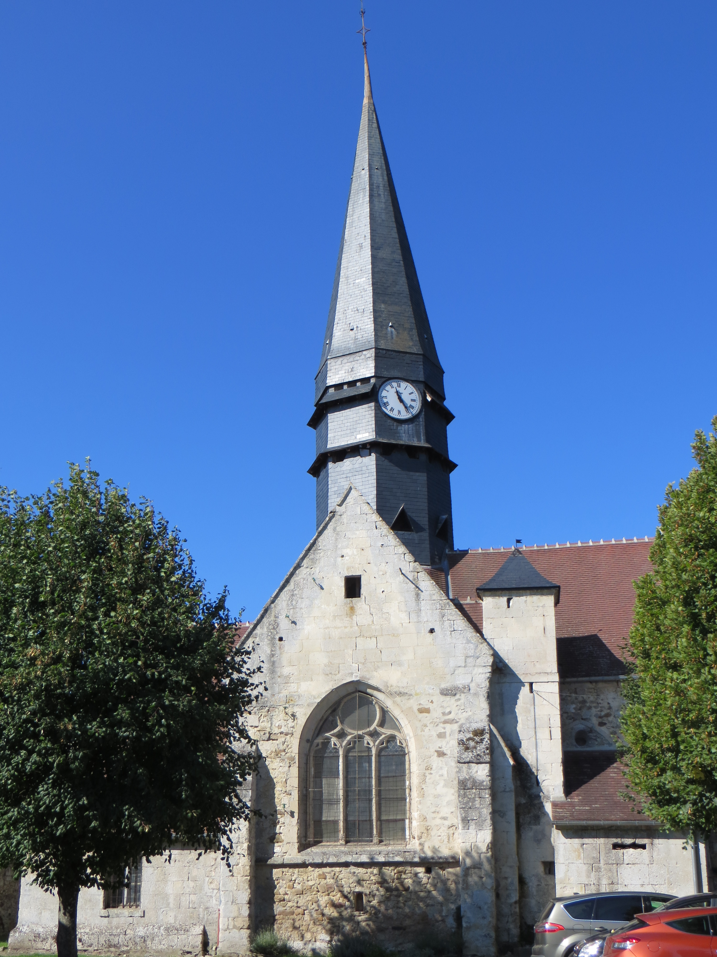 Vue générale de l'église